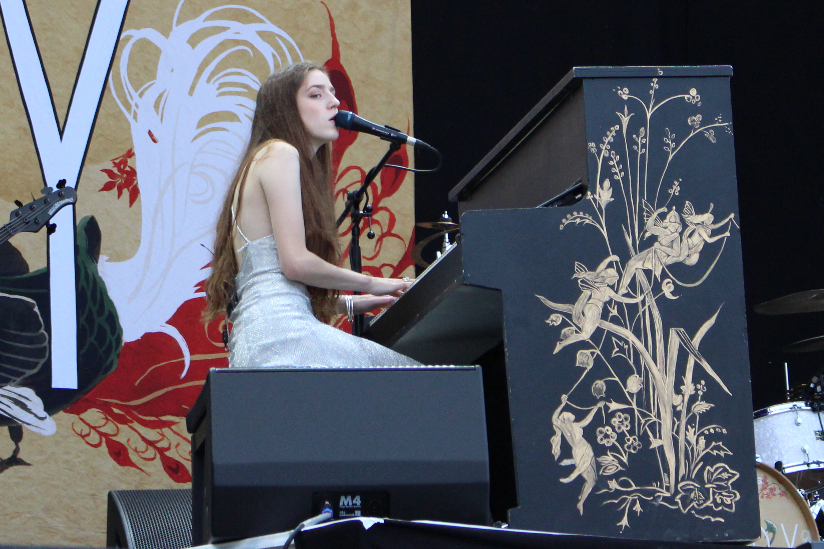 Festivalsommer This photo was created with the support of donations to Wikimedia Deutschland in the context of the CPB project "Festival Summer".